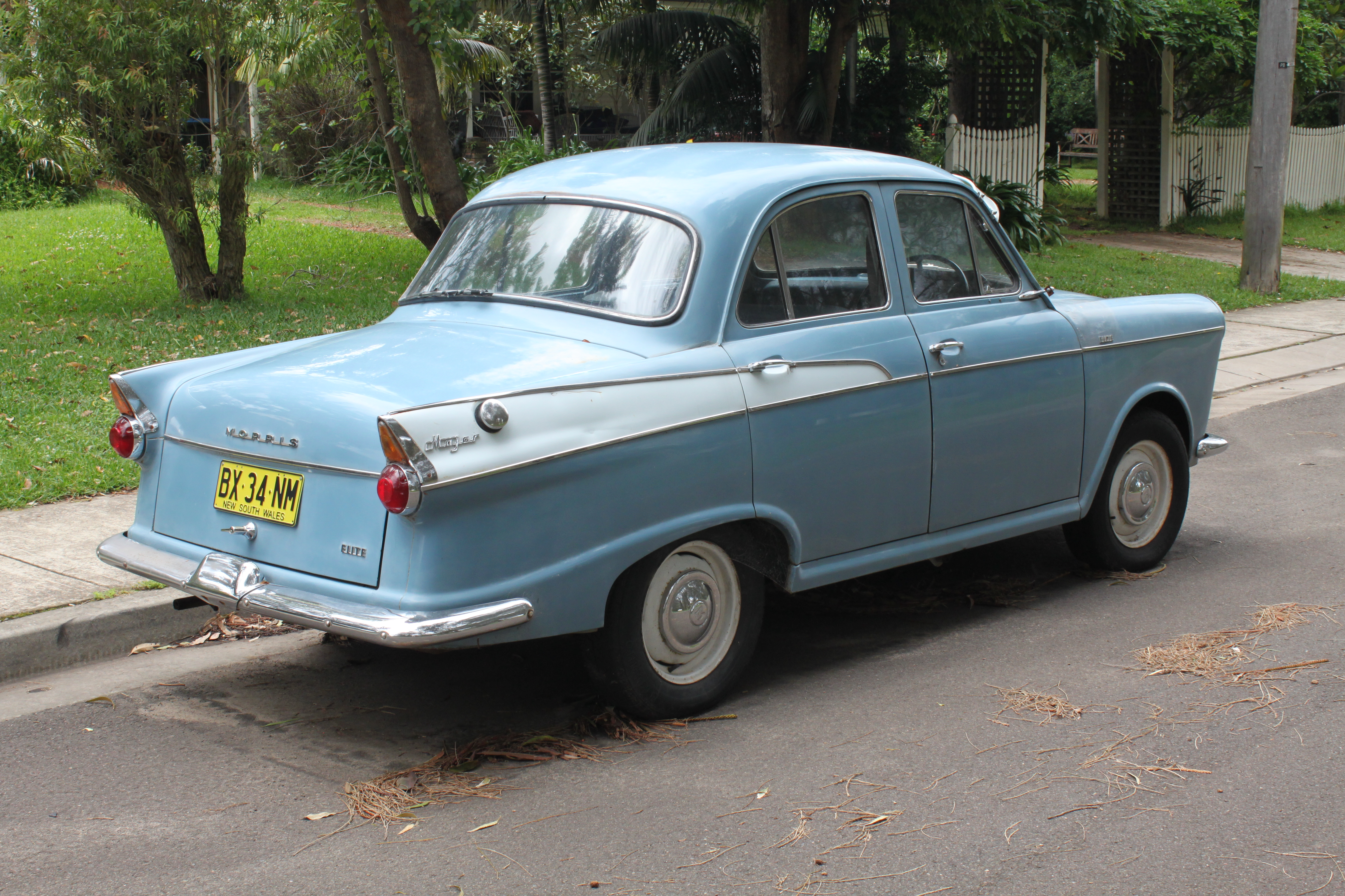 Morris Major Elite